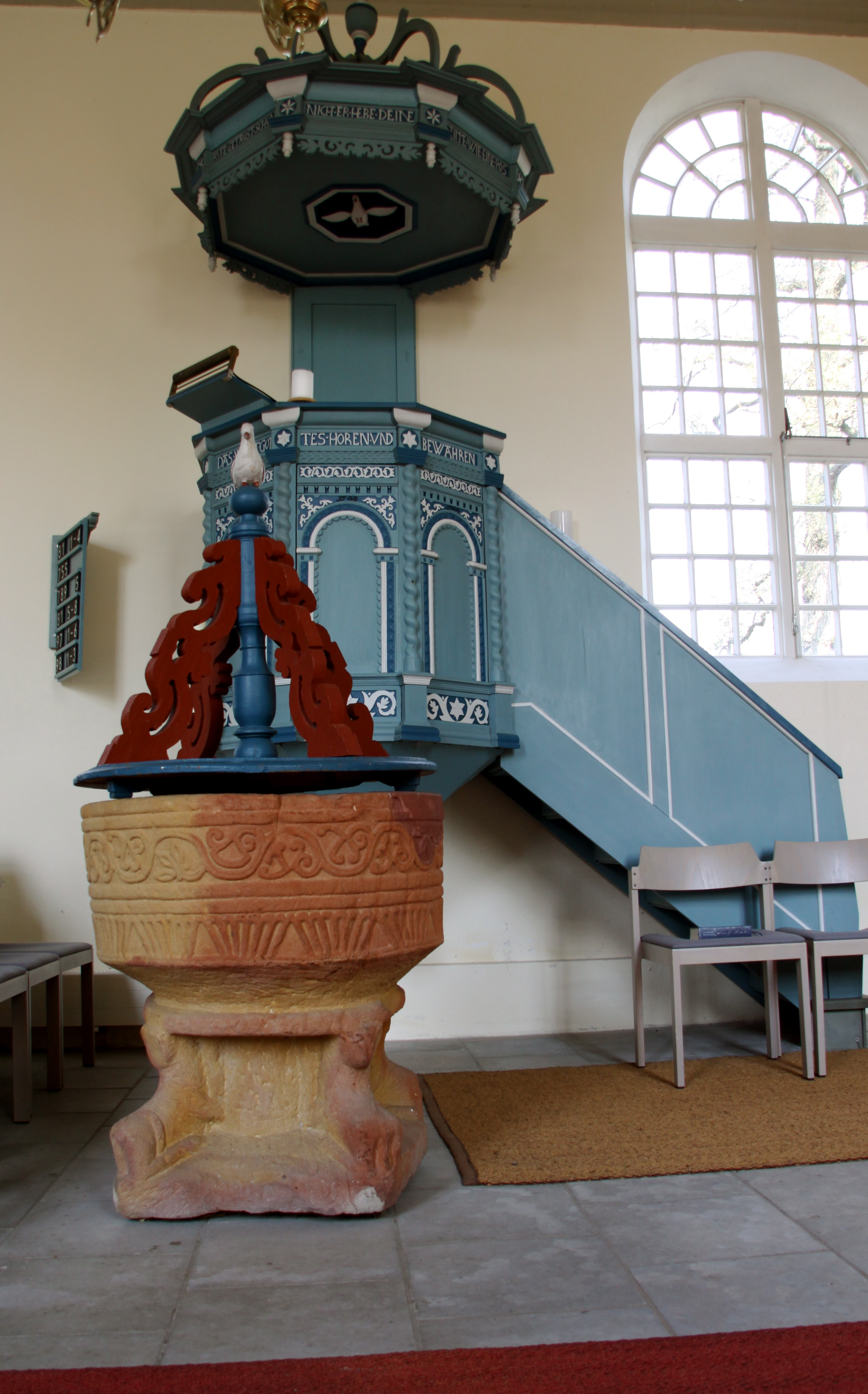 Innenausstattung (Taufstein und Kanzel) der Lutherischen Kirche in Forlitz-Blaukirchen, Ostfriesland, Niedersachsen, Deutschland